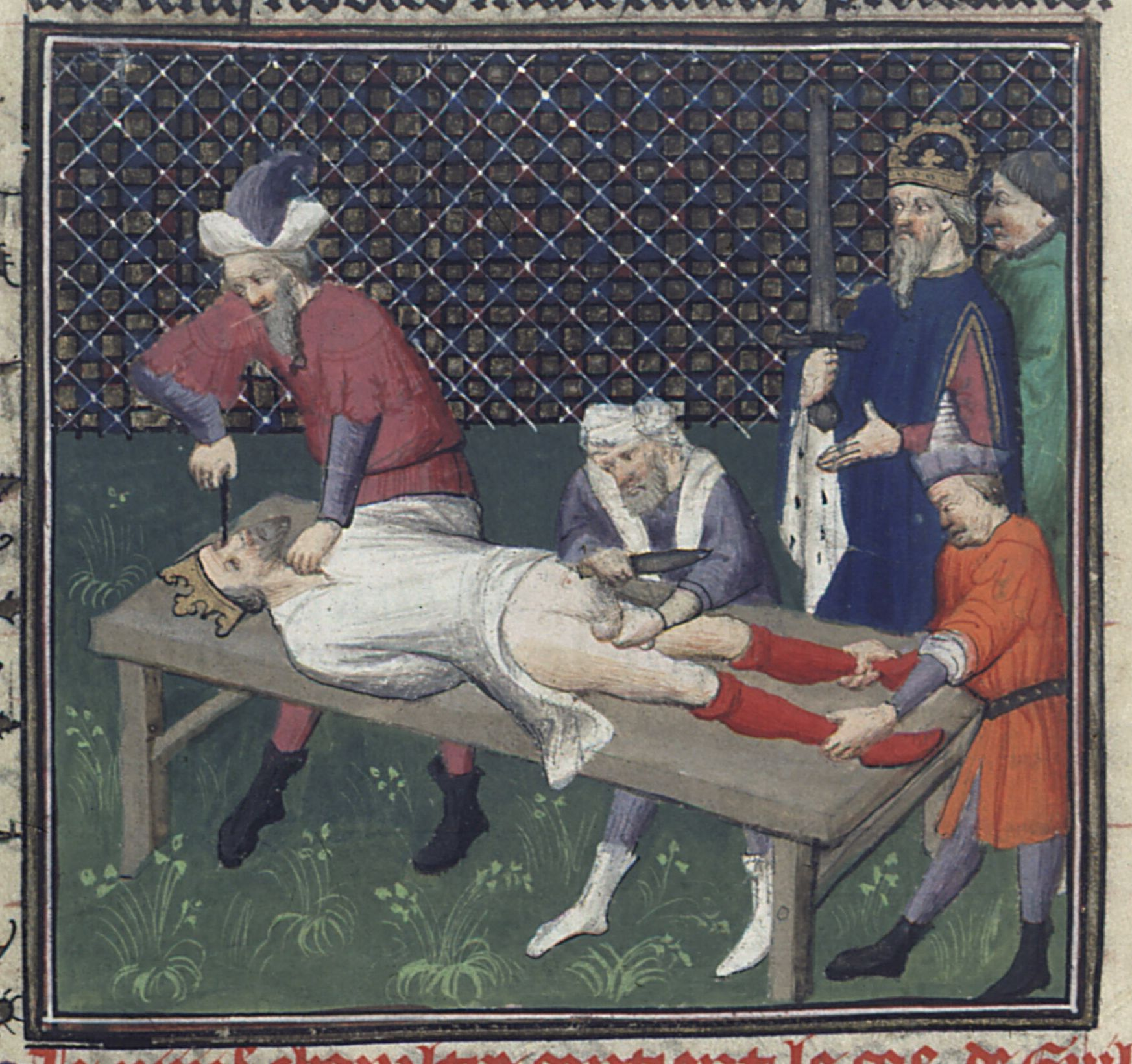 Supplice de Guillaume III de Sicile